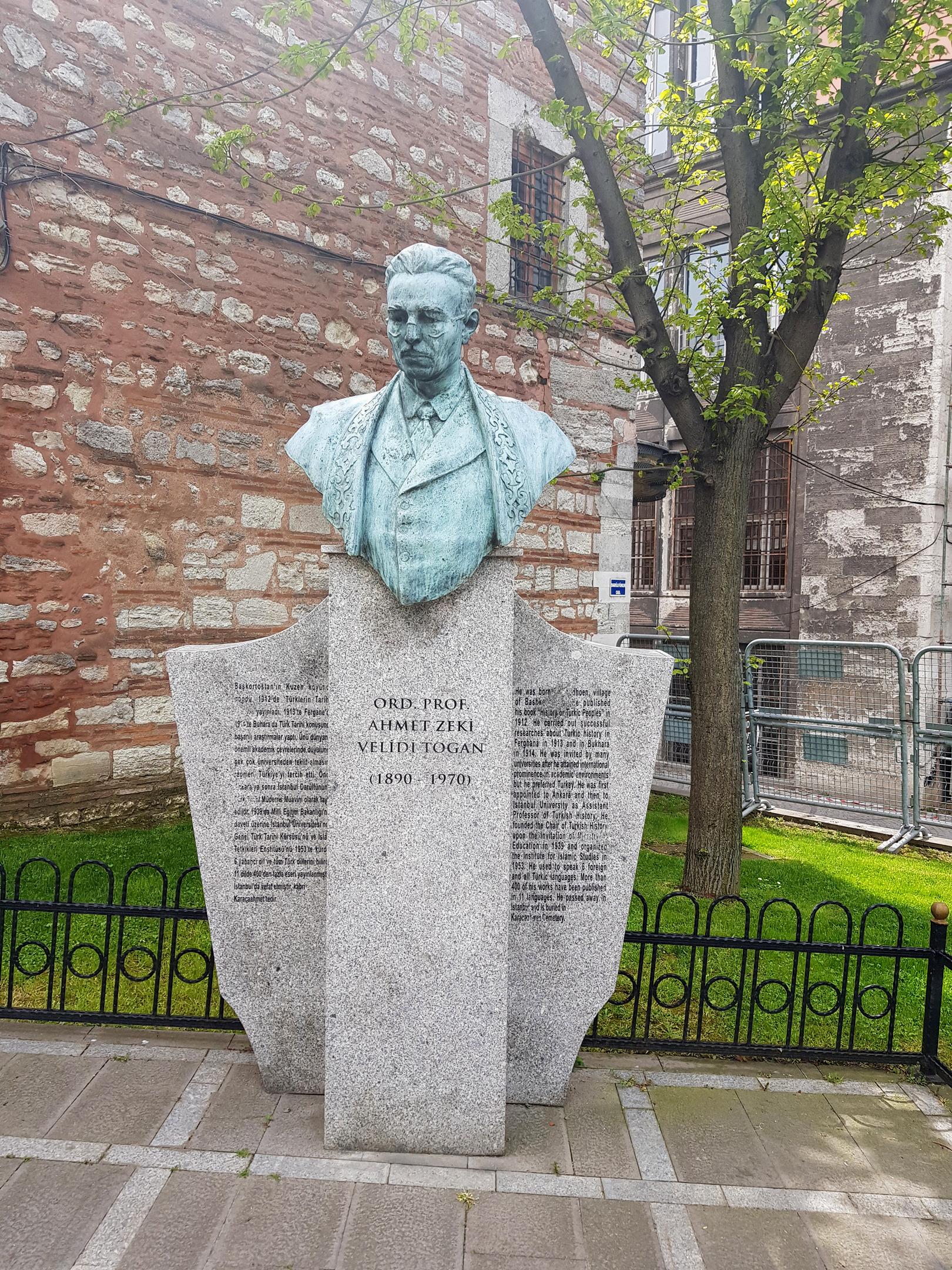 Бюст Ахмет-Заки Валиди Тогану в Стамбульском университете, Турецкая Республика